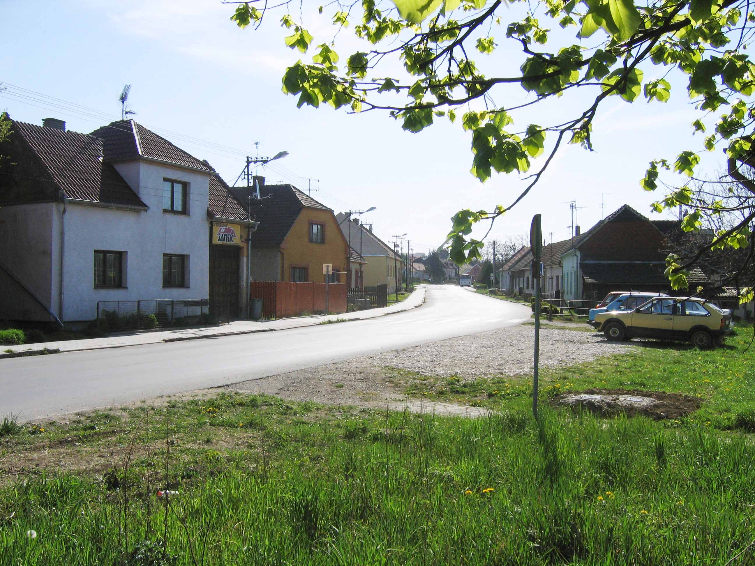 Uherský Brod